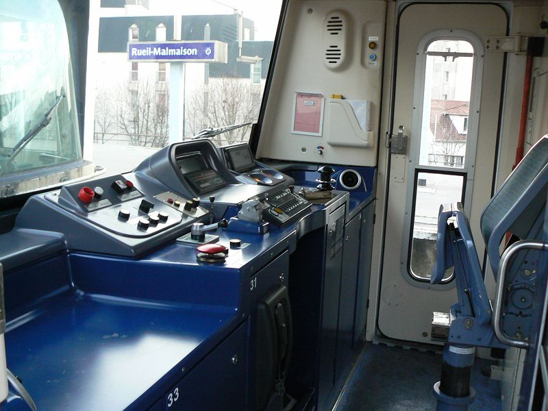 Cabine de conduite d'une MS61 rénovée